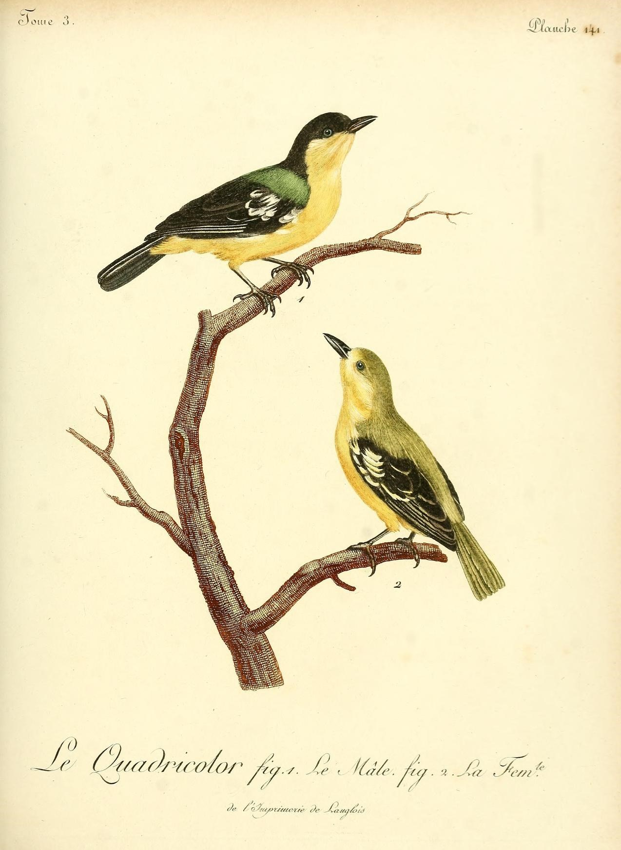 ç Joiue 3 . SI ' (tache i-f-i Le/- CÂs/aaiHcma/ ^(7- / ■ &\ lùi/e. Af.z.Jl C/Z,/.